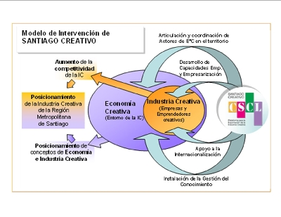 Infográfico acerca do modelo de intervenção do Santiago Creativo